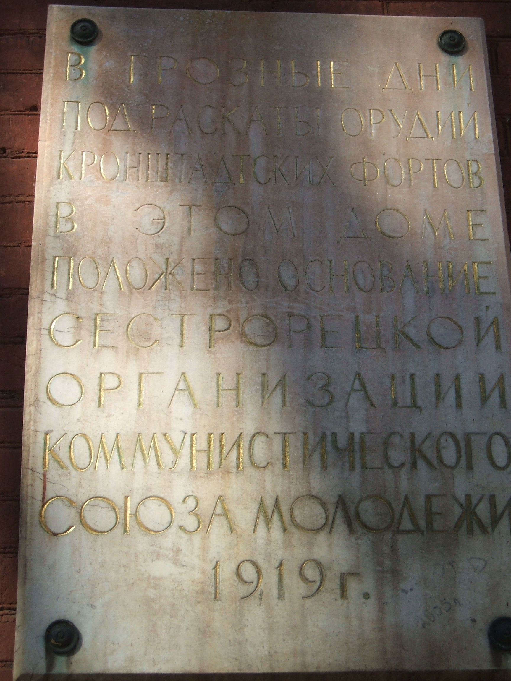 Сестрорецк, СИЗ, здание ПТУ 120 Мемориальная доска рождения сестрорецкого комсомола